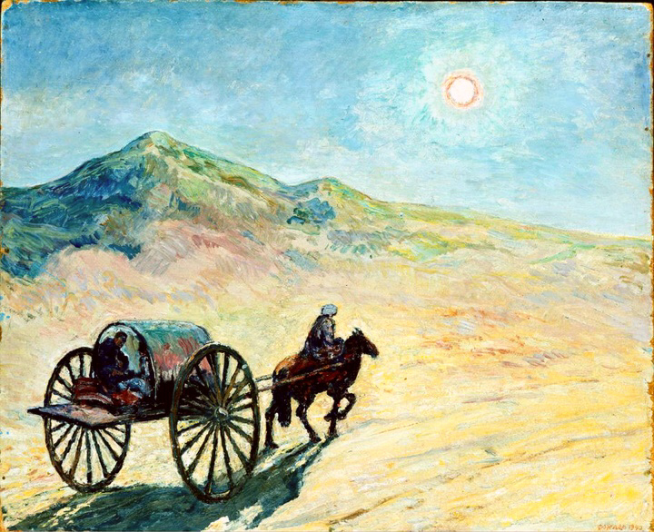 Mondnacht in der usbekischen Wüste. Berlin, Staatliche Museen zu Berlin - Preußischer Kulturbesitz, Nationalgalerie, Inv.-Nr. A III 294 Neue Nationalgalerie Native nameNeue NationalgalerieParent institutionBerlin State MuseumsLocationBerlinCoordinates52° 30′ 25.17″ N, 13° 22′ 02.71″ E Established1968Web page control : Q32659772 VIAF: 142711389 ISNI: 0000 0001 1945 5804 LCCN: n92076661 GND: 5298136-8 WorldCat institution QS:P195,Q32659772